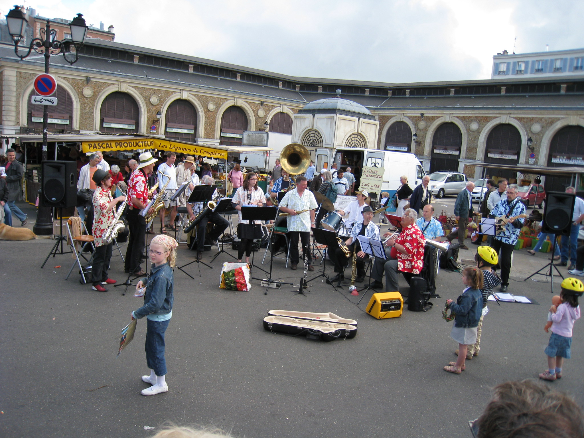 Market place (Notre-Dame)